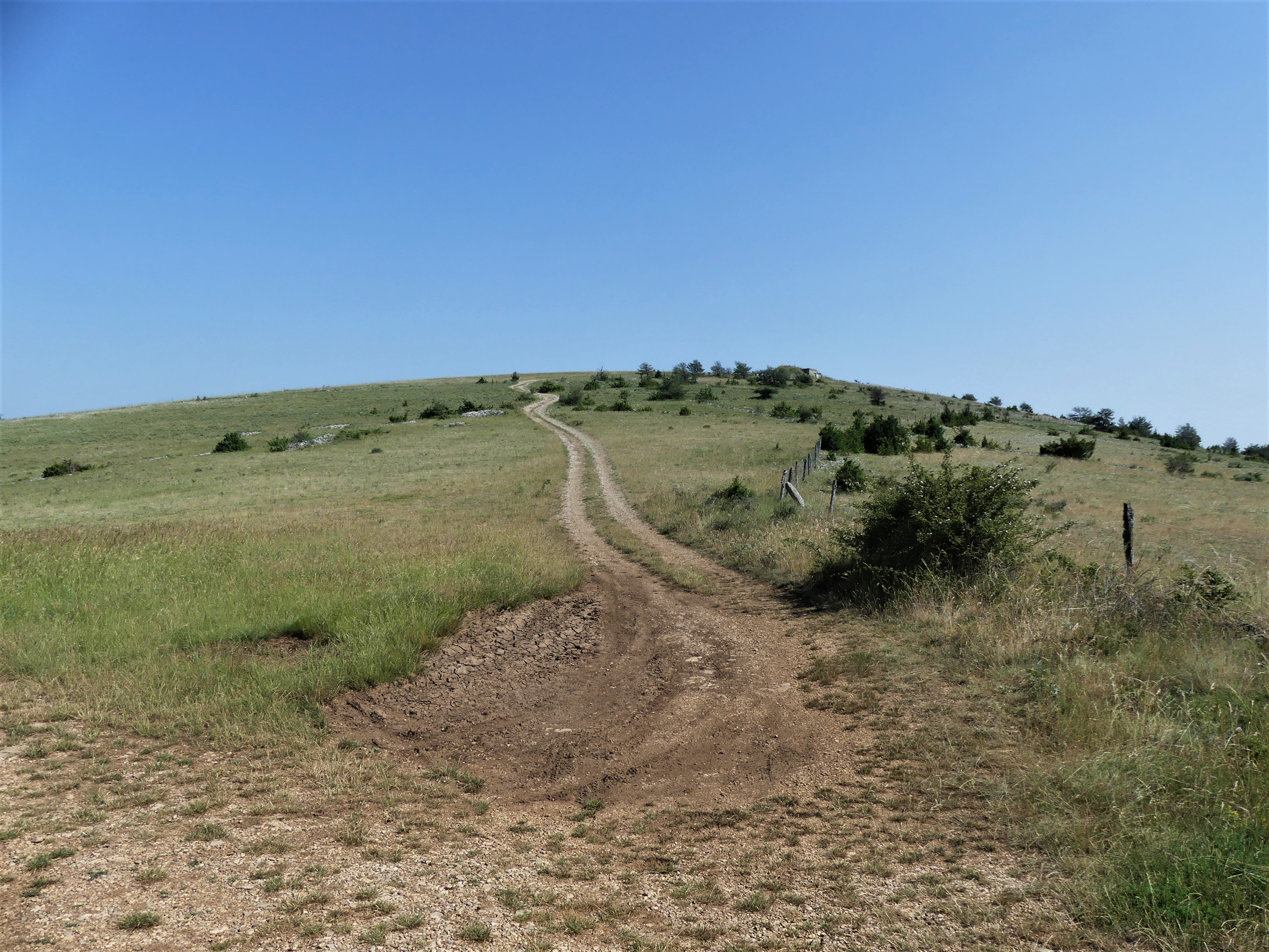 Sur le causse Méjean, vue sur un sommet de 1 048 mètres depuis le site de la tombe du Géant, Hures-la-Parade, Lozère, France.